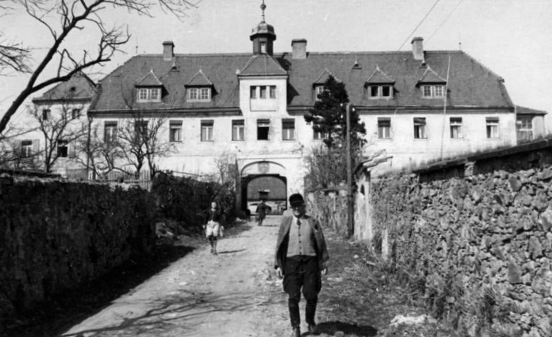 Holtendorf, altes Herrenhaus ADN-ZB/ 30.5.1949/ Das grössere Stück Brot - im Kreise Görlitz. Auch im Kreise Görlitz in Holtendorf sind in diesem Jahr die Bauern und Neubauern mit größerem Elan an die Bestellung der Felder gegangen, weil sie durch die Unterstützung der MAS wesentliche Erleichterungen erhielten. UBz.: In diesem ehemaligen Herrenhaus wird in Kürze die Kulturstätte errichtet.